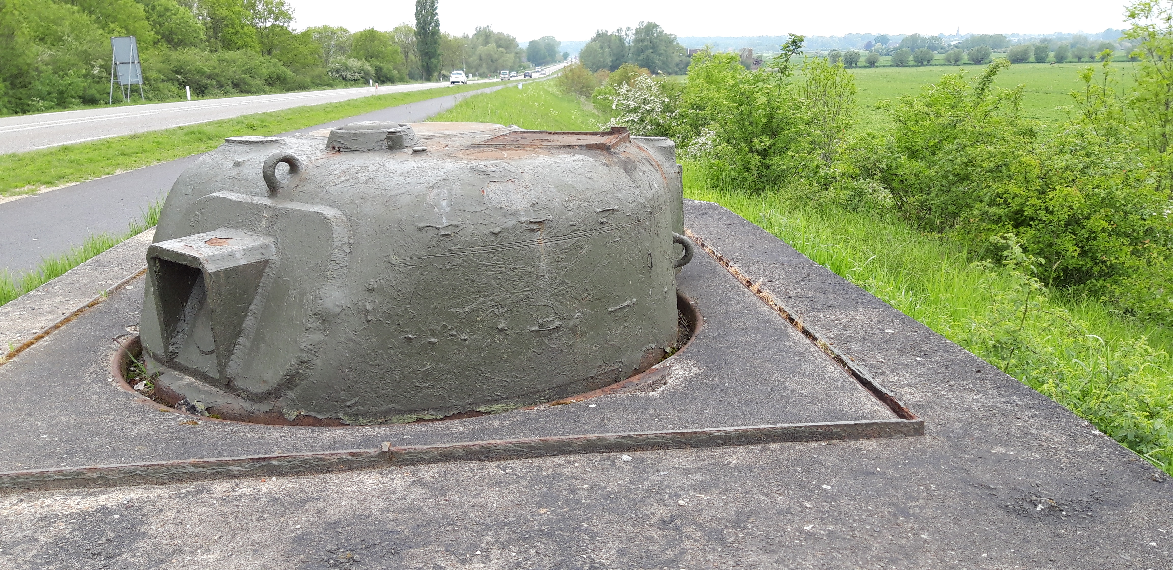 Ingegraven Shermantank bij de IJsselbrug in de N317 bij Doesburg - onderdeel voormalige IJsselinie